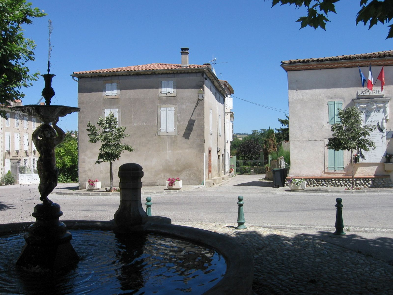 Village de Saint-Amadou, Ariège - Midi-Pyrénées - France / Centre du village : fontaîne, Mairie.